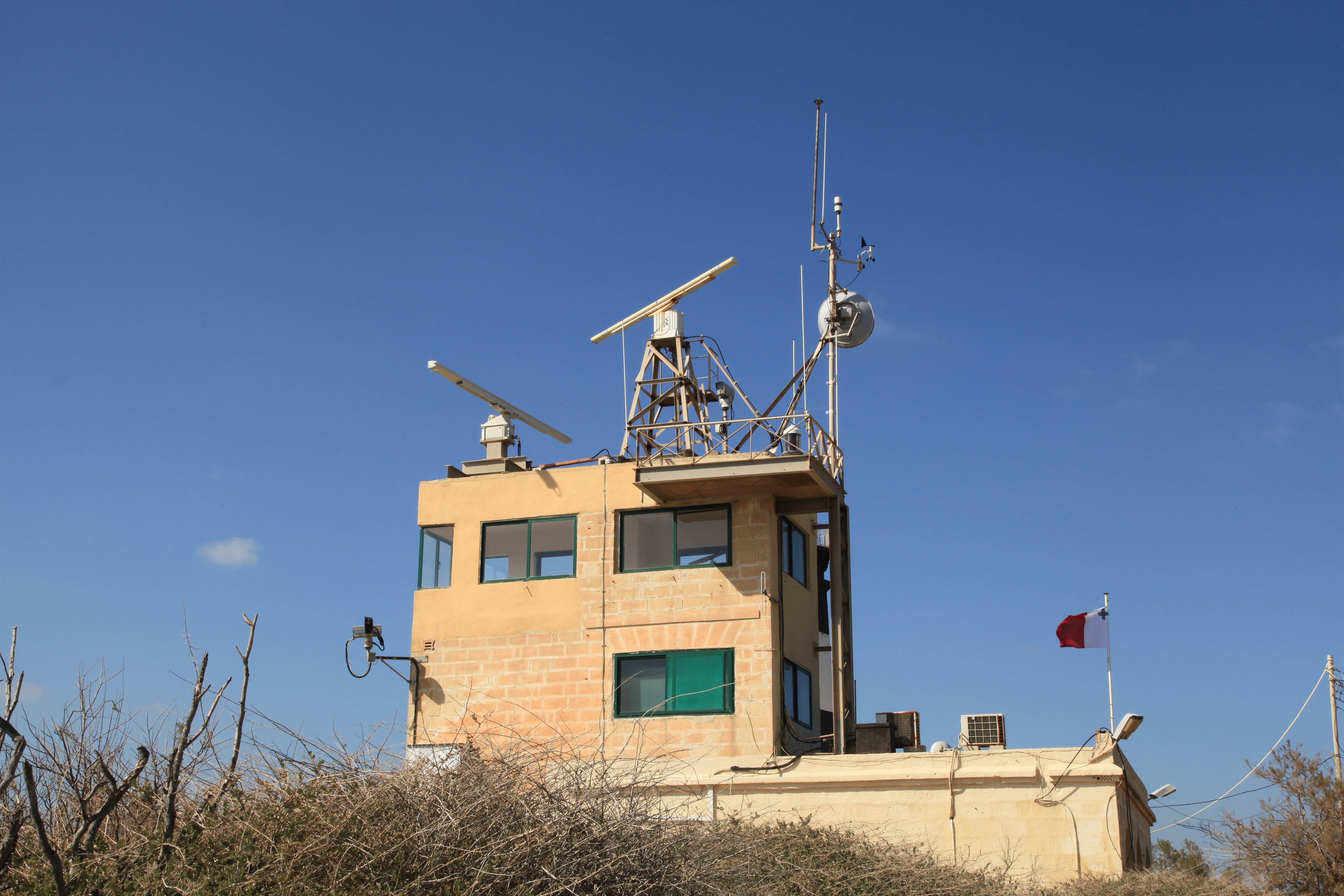 Delimara Lighthouse, Triq Delimara in Marsaxlokk, Malta